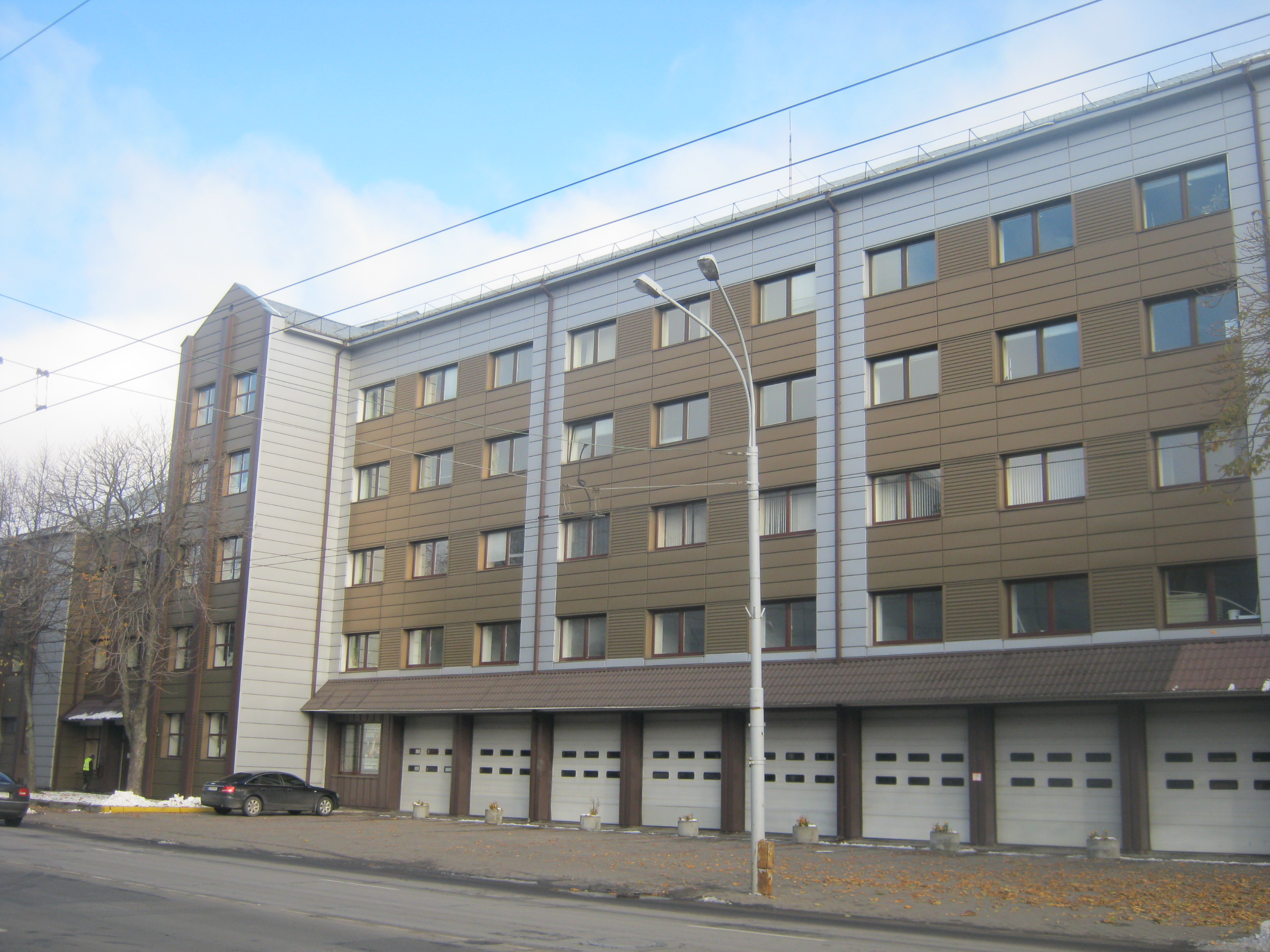 Vilnius